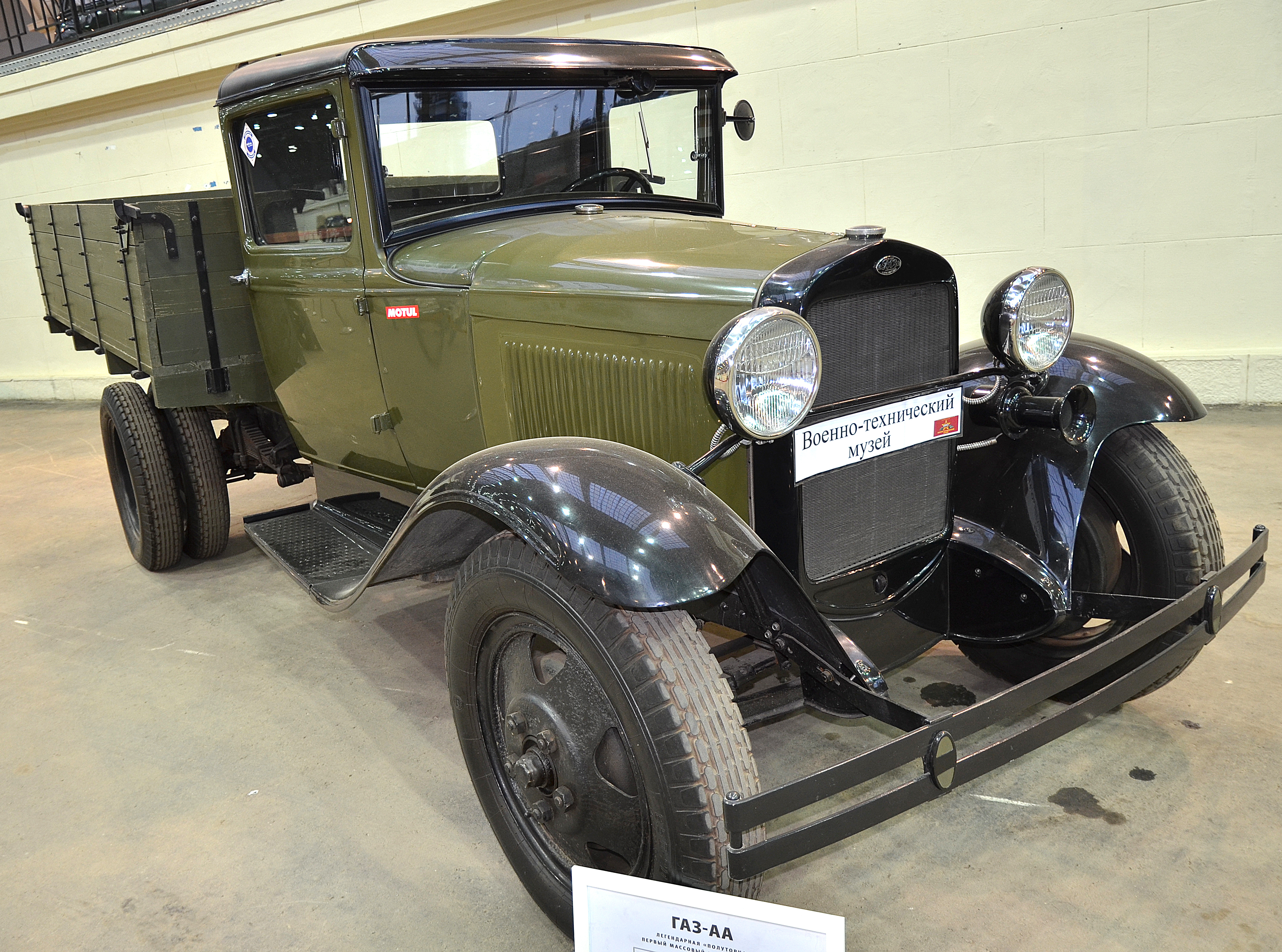 Можно увидеть здесь : You can see here